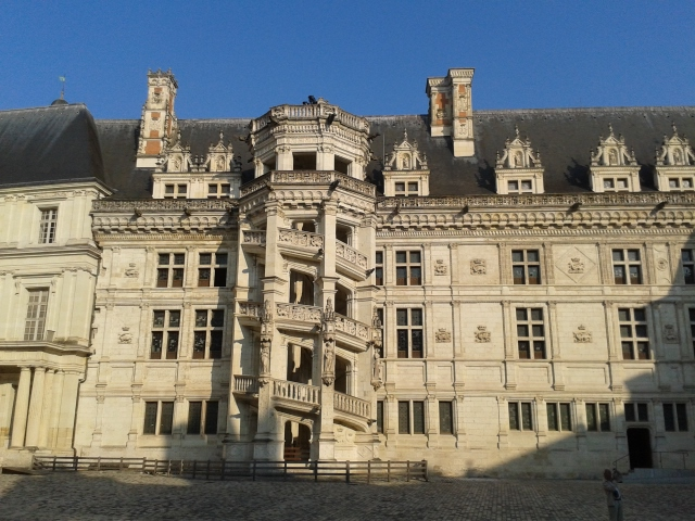 Château (Classé) .